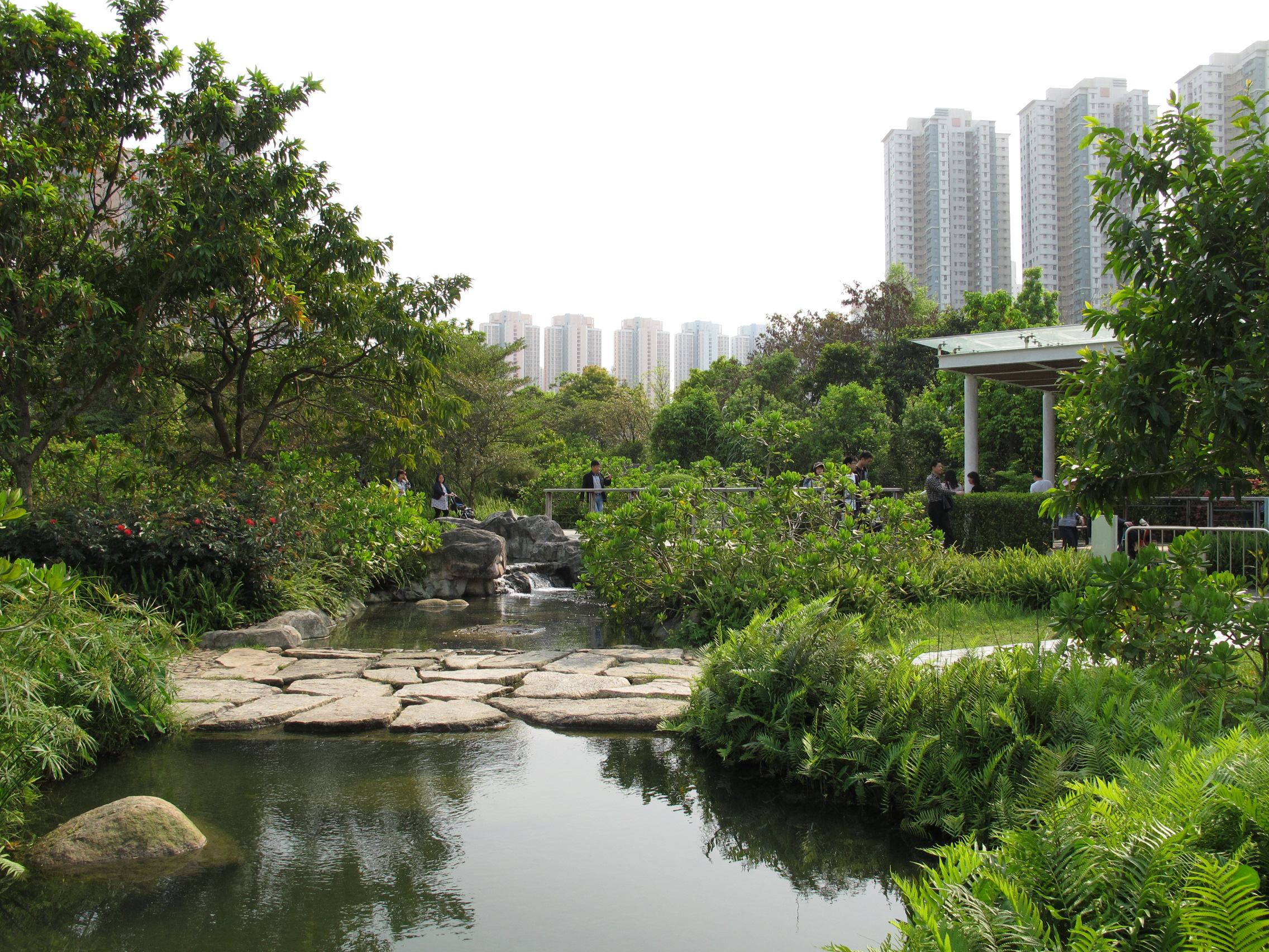 Hong Kong Wetland Park Stream Walk